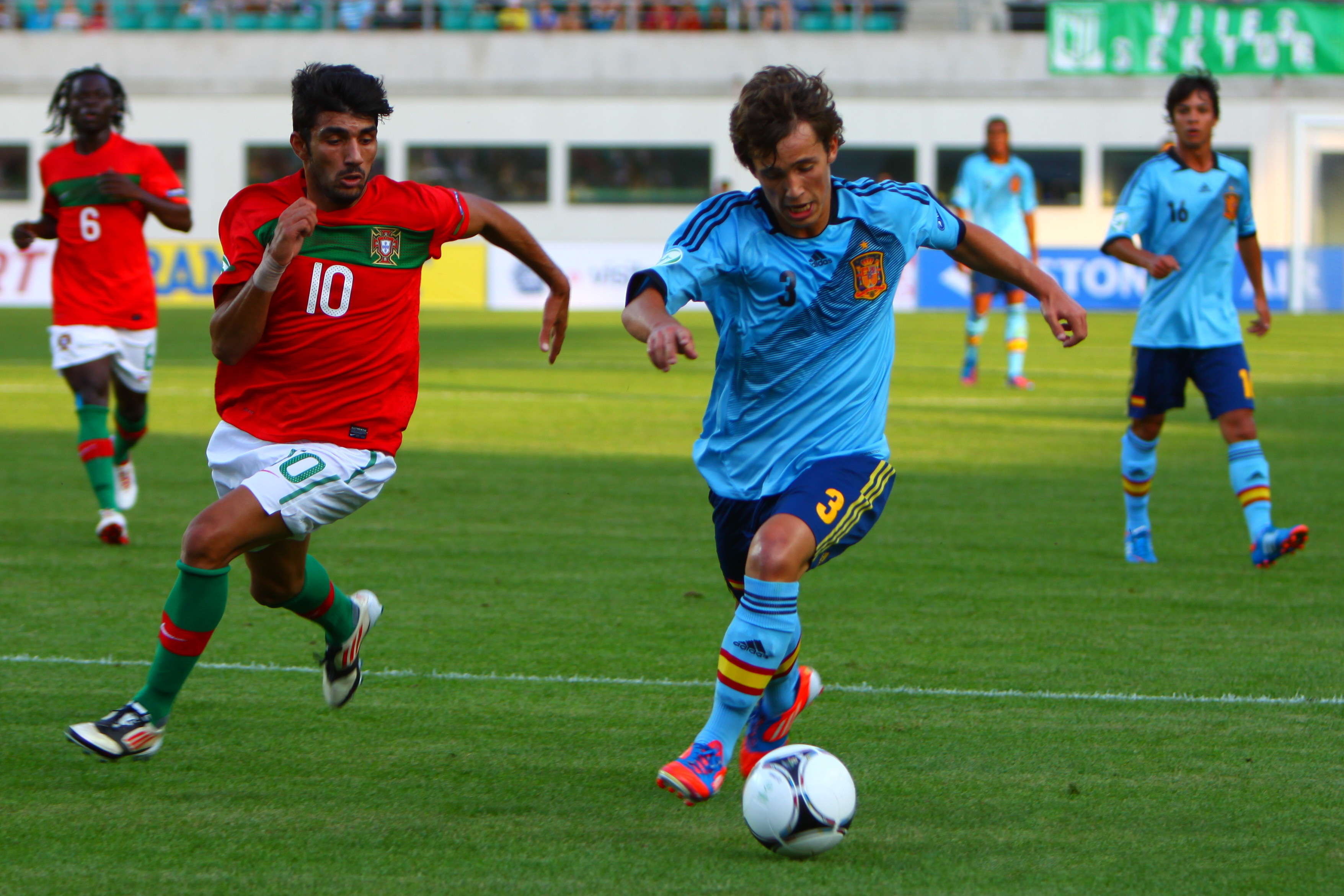 U-19 Portugal vs Spain.